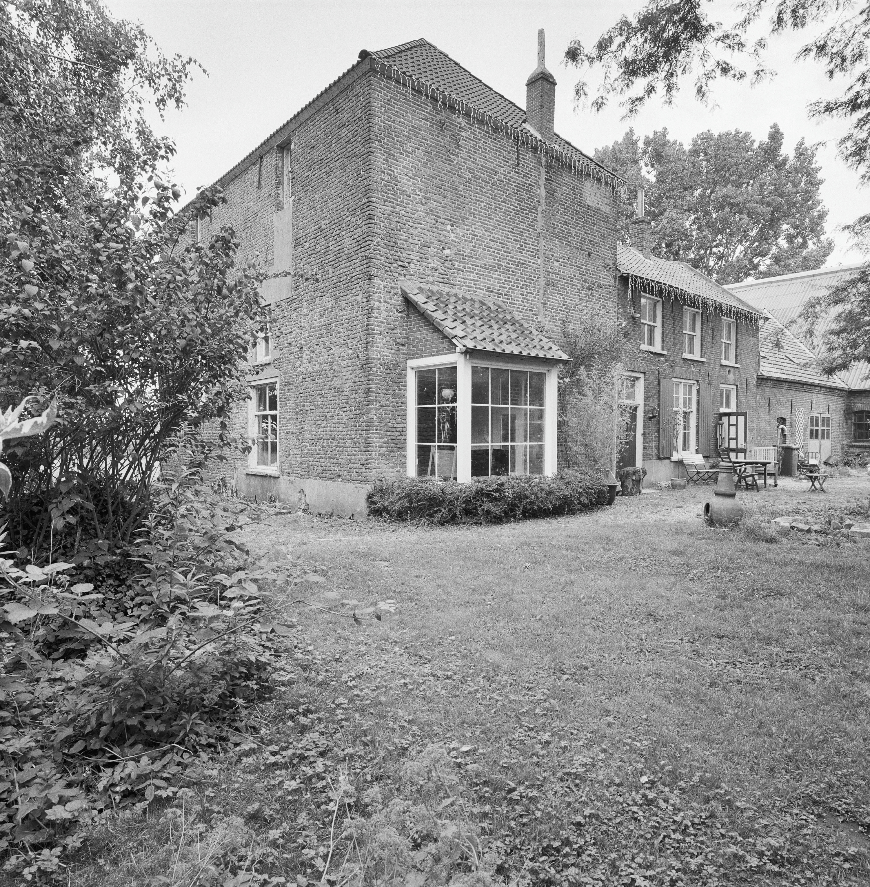 Groot Rijswijk: Exterieur linkerzijgevel en voorgevel havezathe